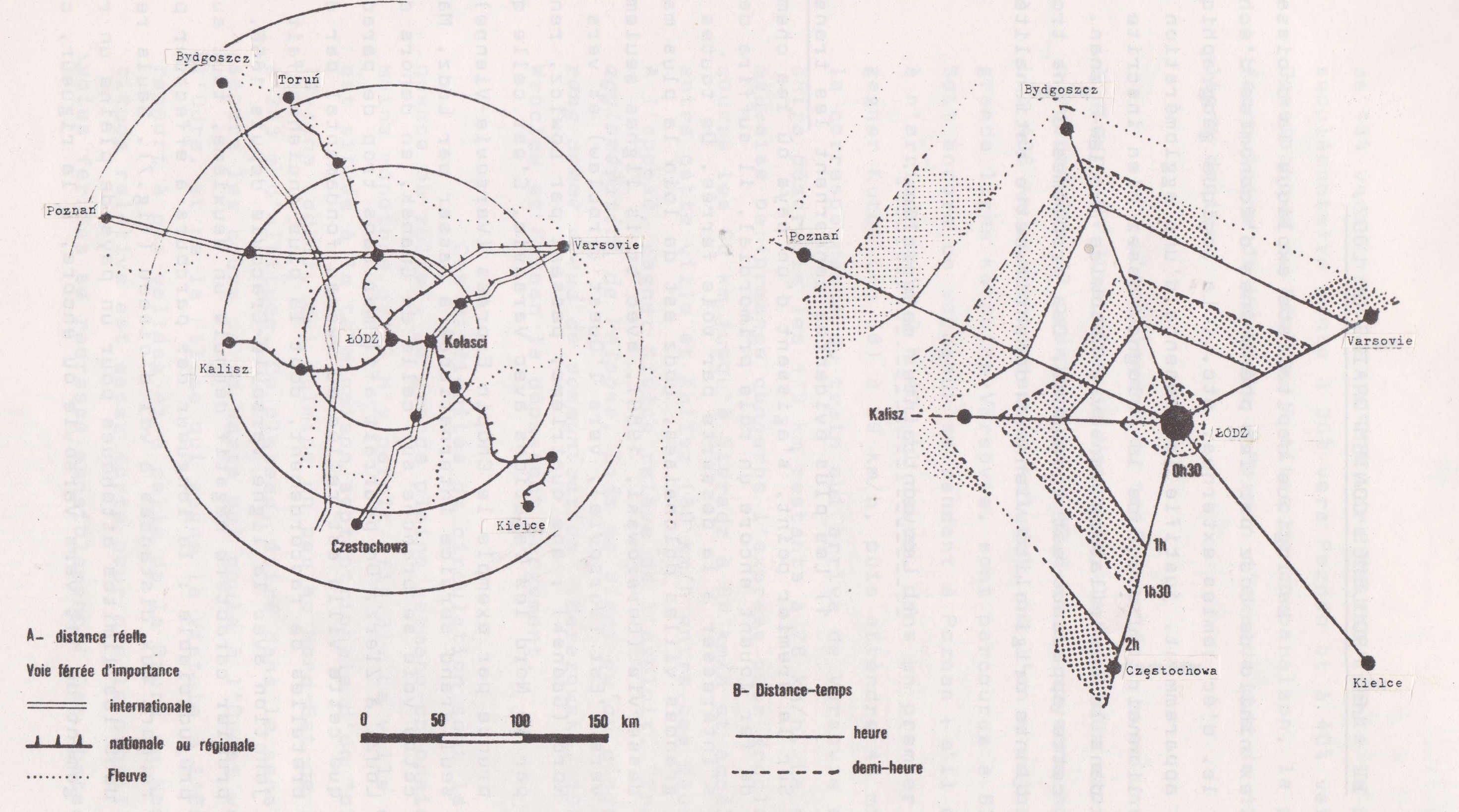 La ville de Lodz est à l'écart des grandes lignes ferroviaires internationales